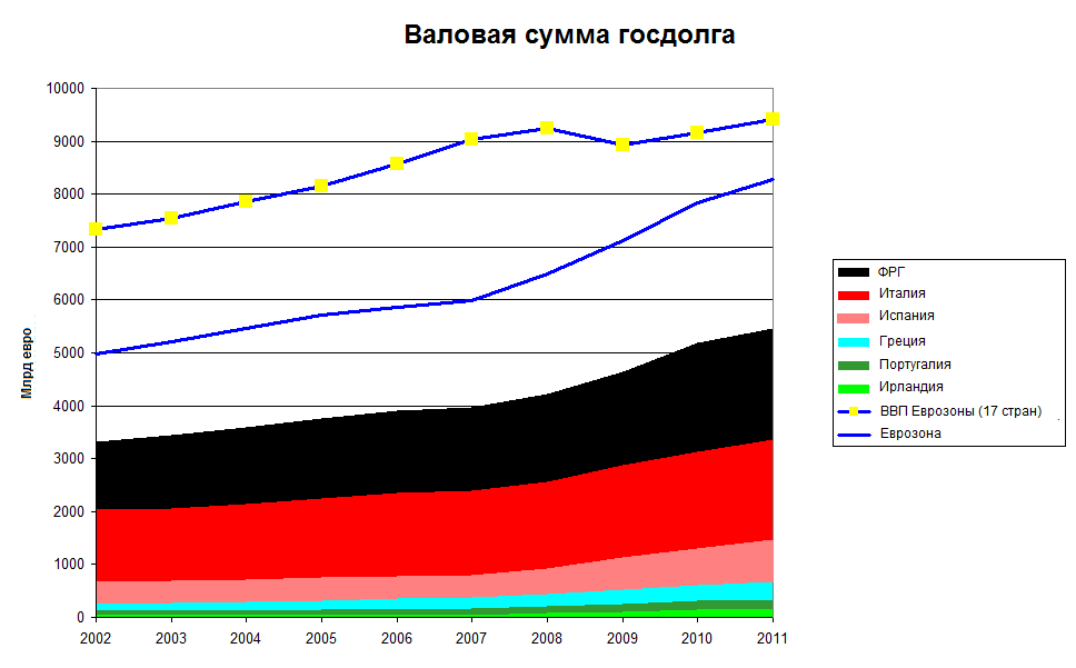 Валовая сумма госдолга отдельных стран еврозоны на основе информации, представленной в ameco, банке данных Европейской комиссии.